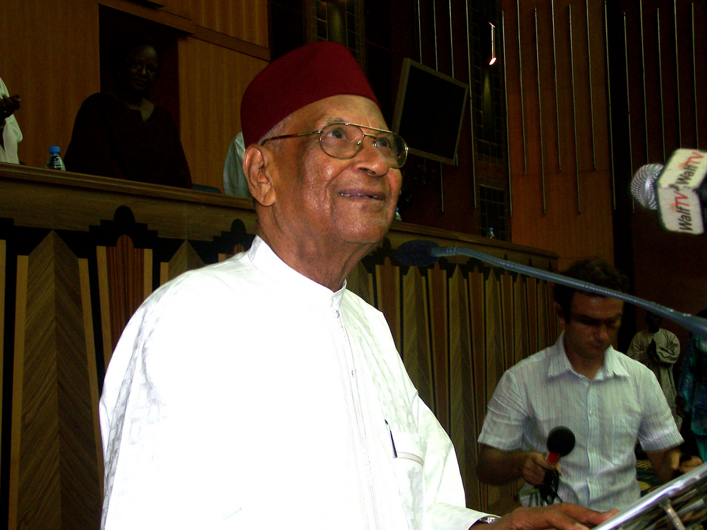 Amadou-Mahtar Mbow président les Assises nationales du Sénégal à Dakar